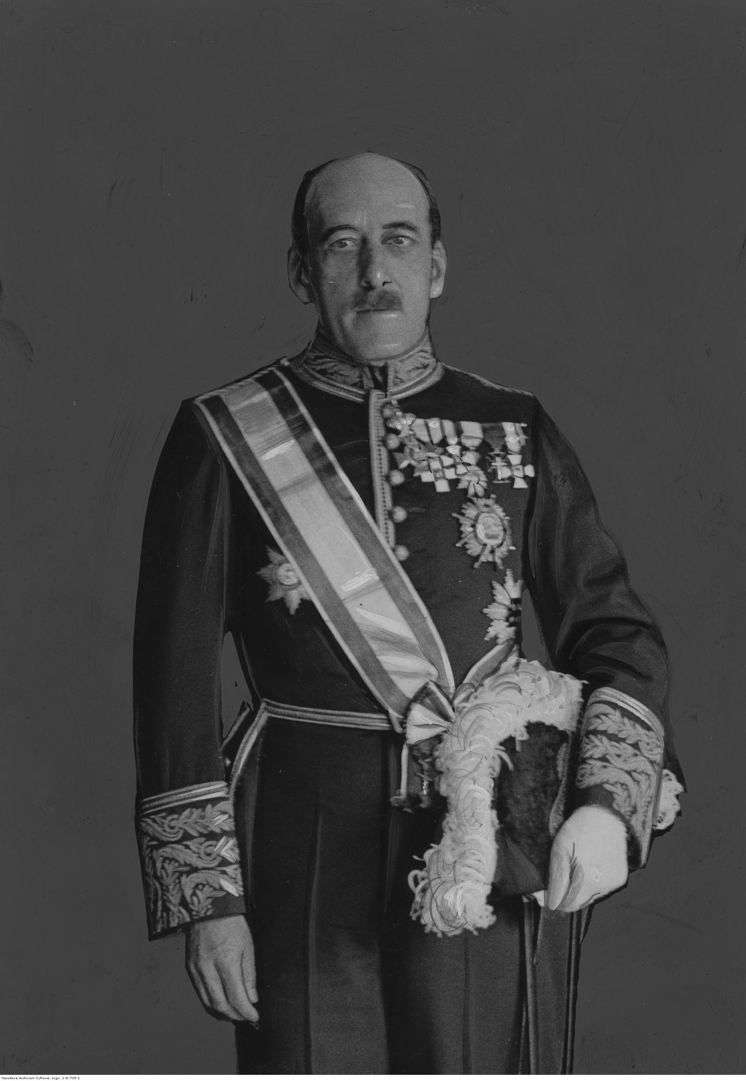 Francisco Serrat y Bonastre